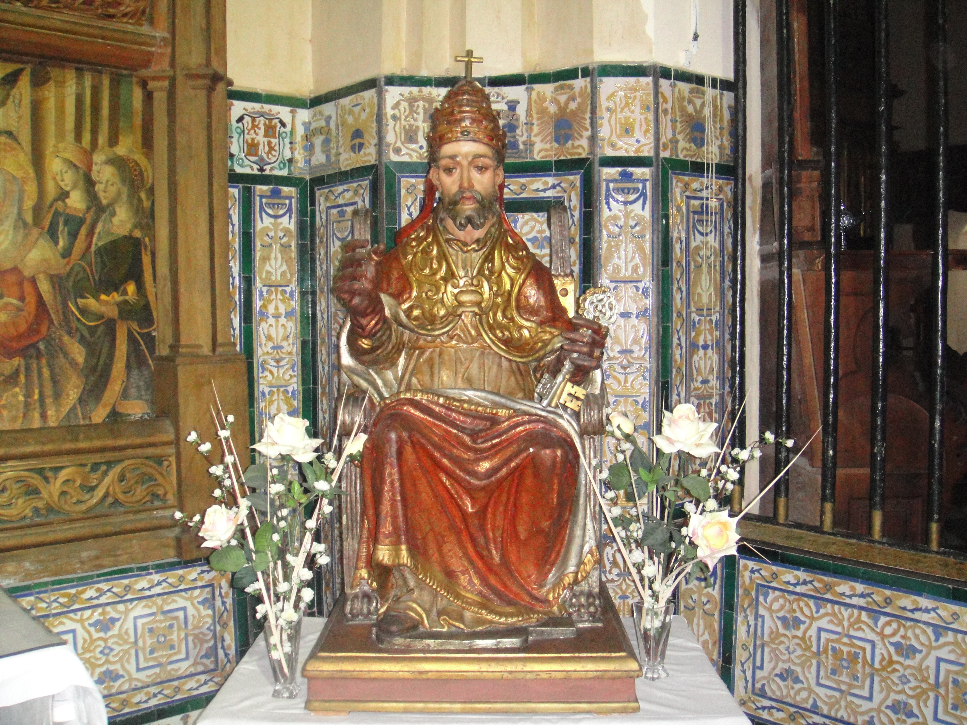 San Pedro. Capilla del Sagrario de la iglesia de Nuestra Señora del Castillo de Fuente Obejuna, provincia de Córdoba, (España).